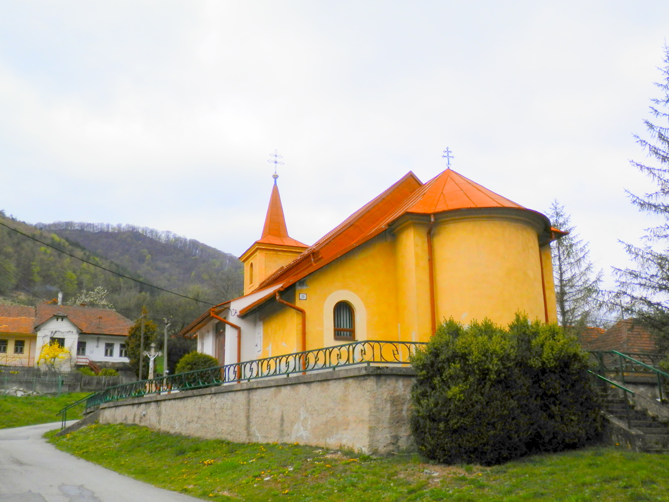 Kostol. Obec Veľká Lodina, okres Košice okolie.